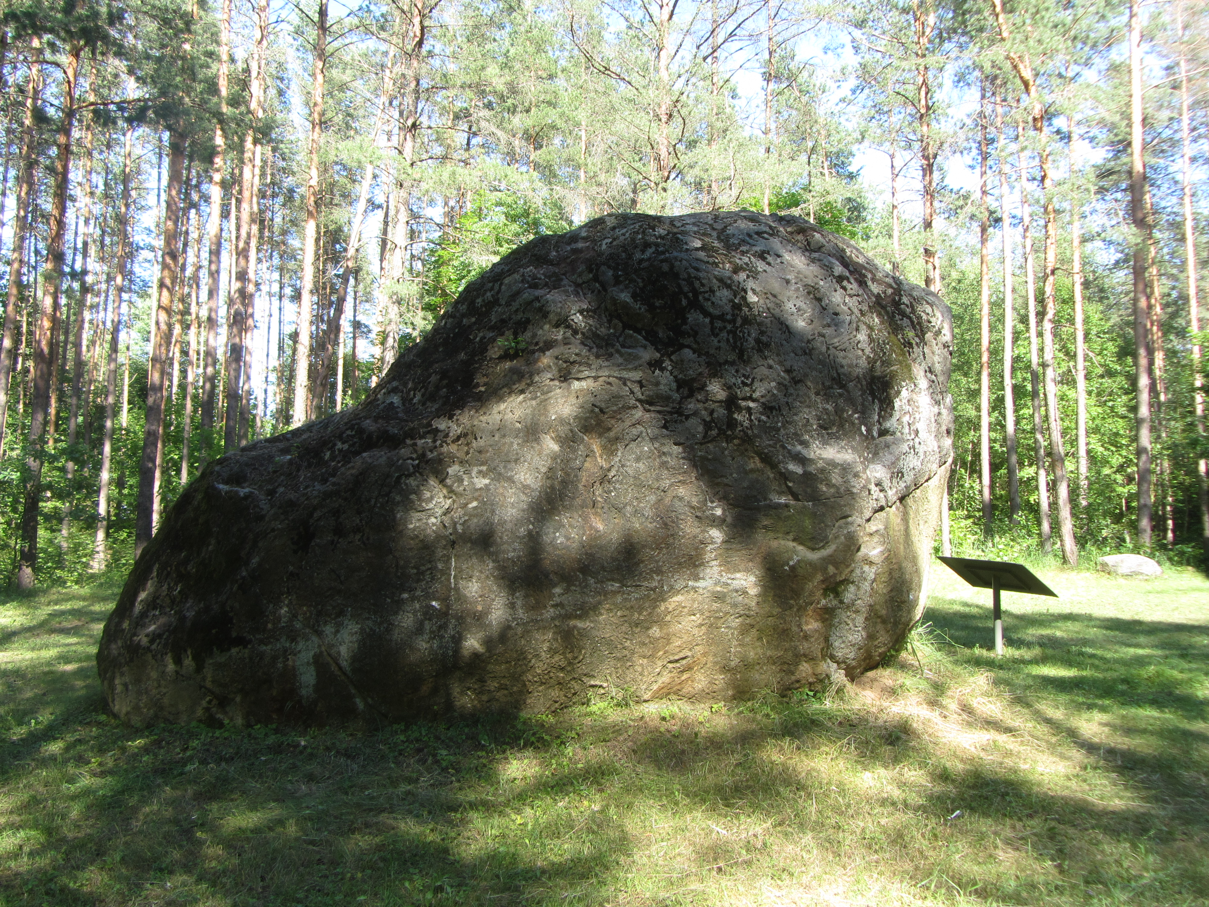 Nemunaičio sen., Lithuania